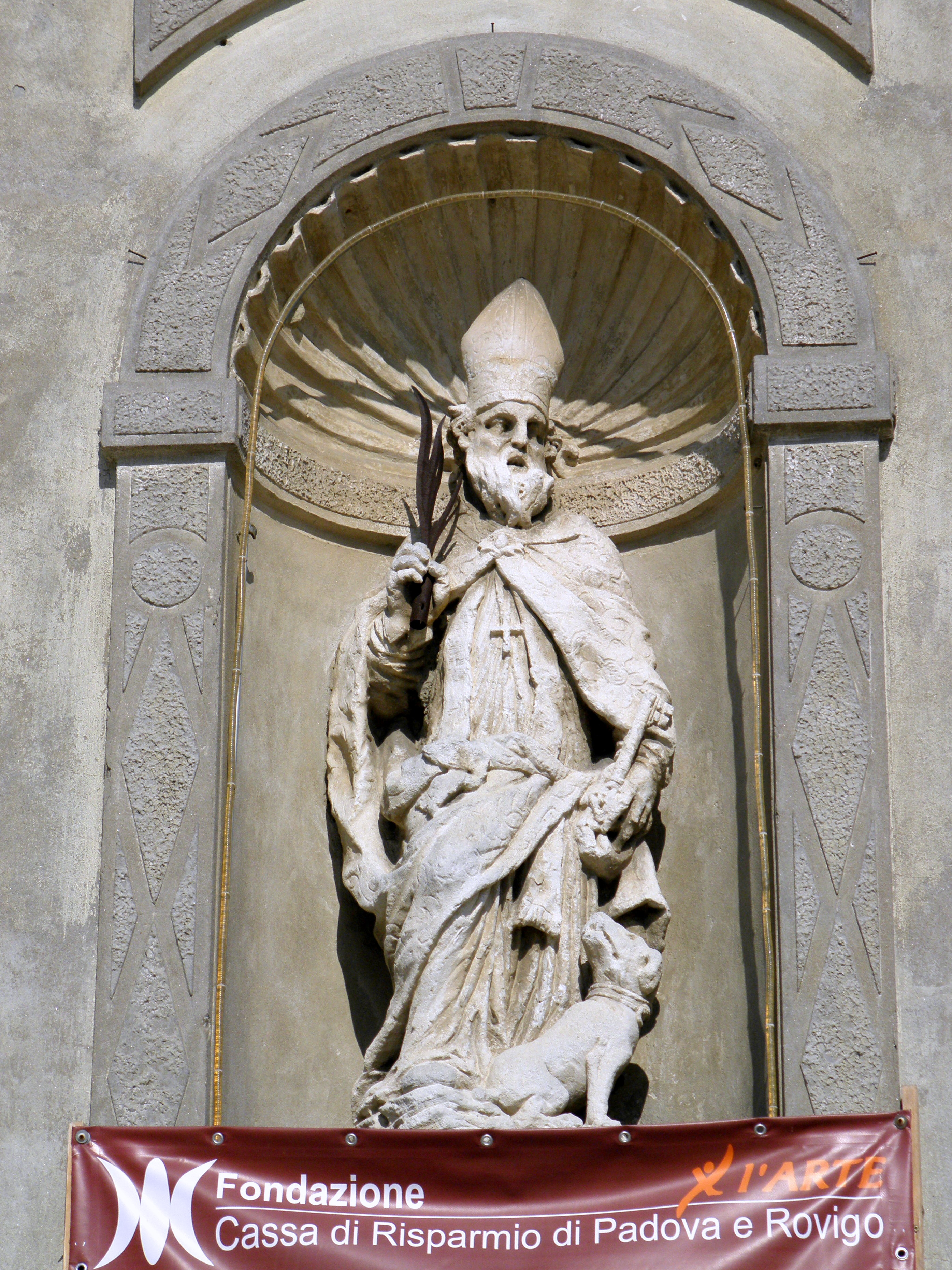 Ceregnano, chiesa parrocchiale di San Martino vescovo: la statua di San Bellino di Padova che orna la nicchia di sinistra della facciata.